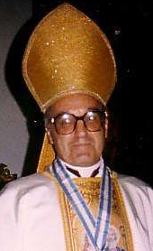 Mons. Francisco José Pérez y Fernández-Golfín, obispo de Getafe (1991-2004) This file has been extracted from another file: Francisco José Pérez y Fernández-Golfín.jpg